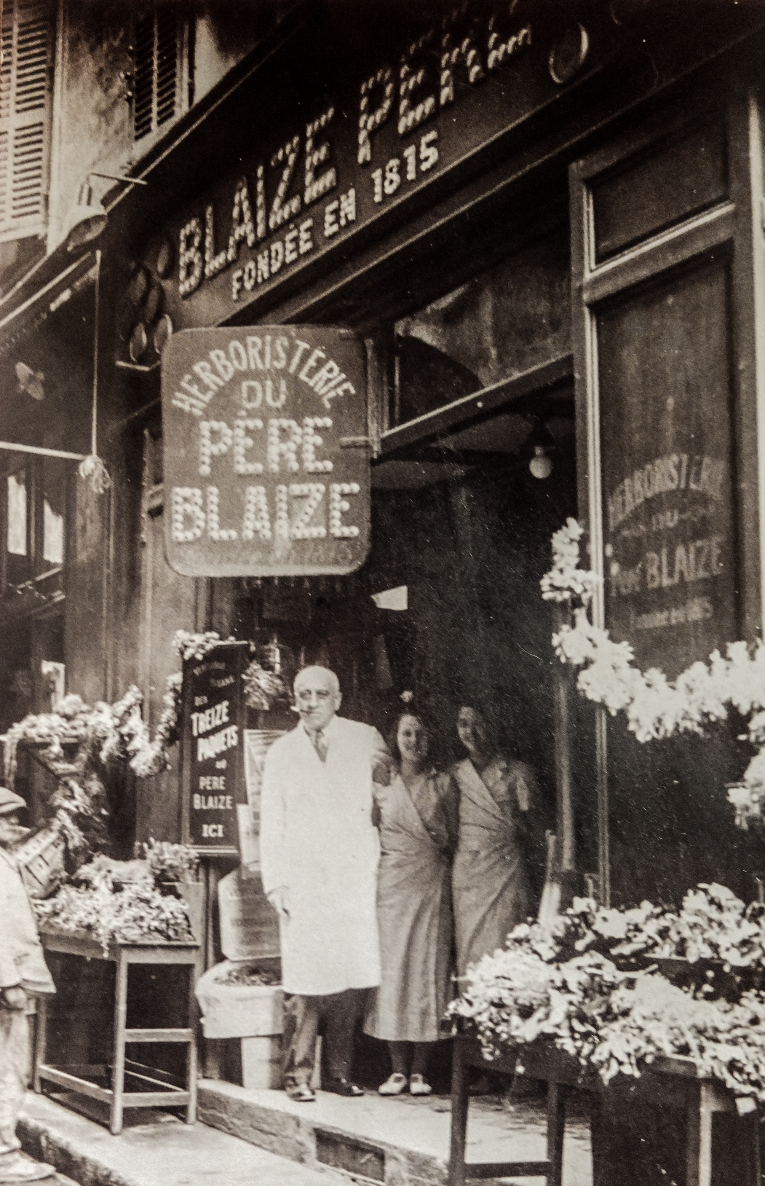 Pharmacie Herboristerie du Père Blaize à Marseille circa 1920